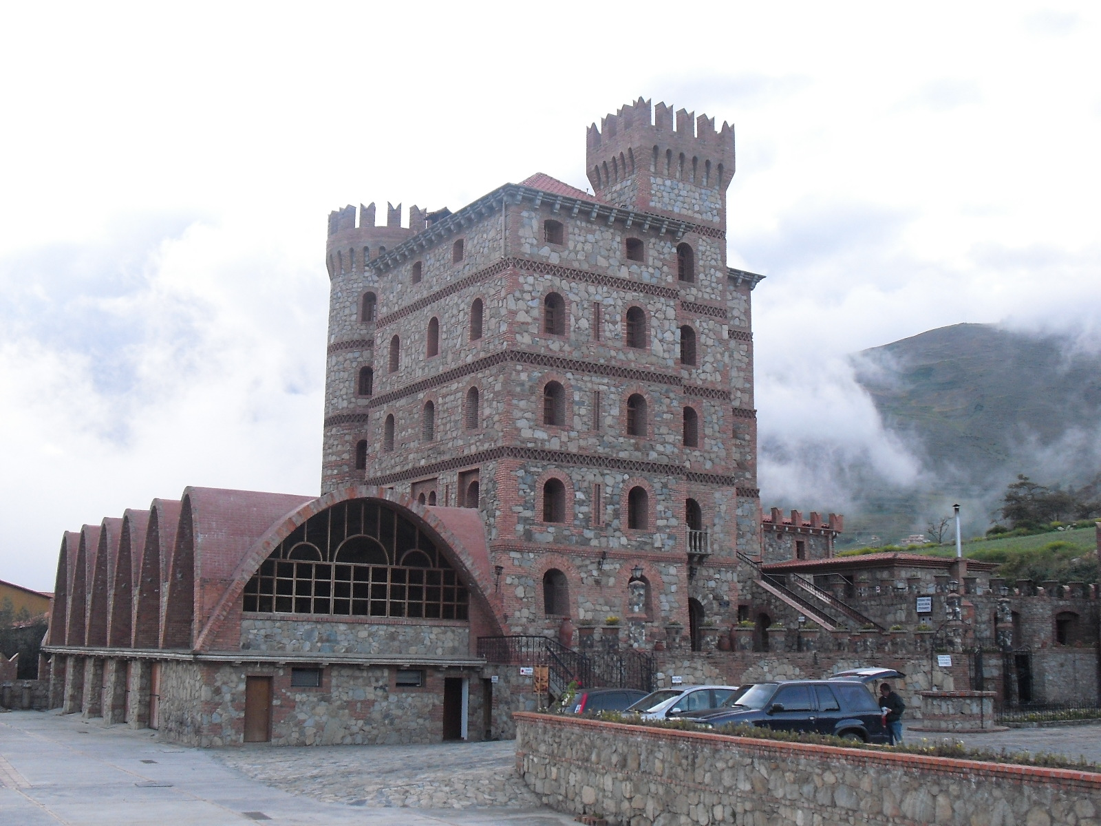 hotel "Castillo de San Ignacio", mucuchies, edo. merida.